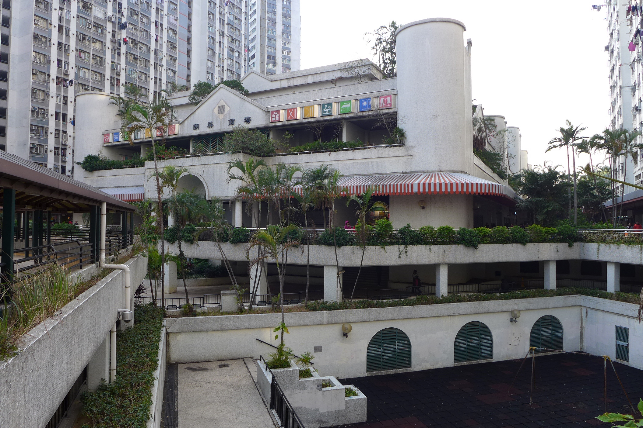 Long Ping Estate Shopping Centre